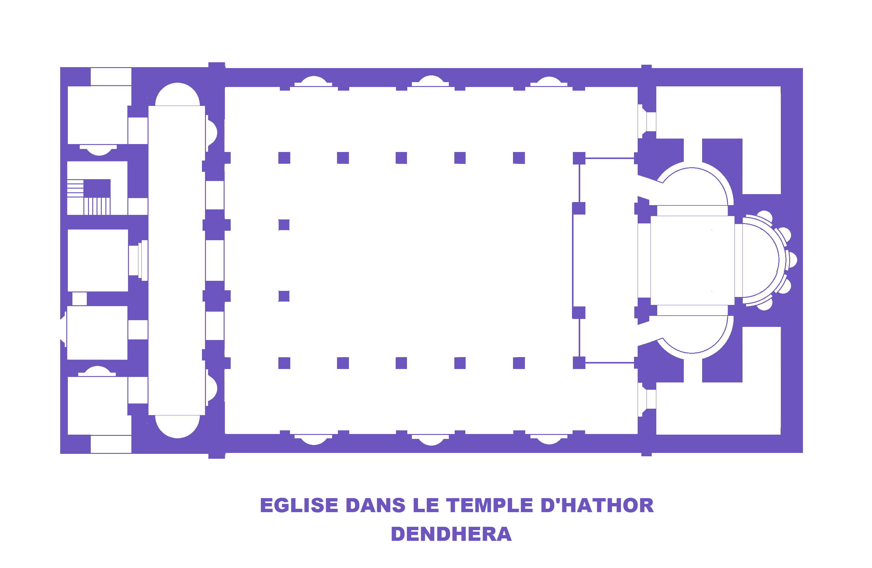 Dendhéra, plan de l'église paleochrétienne dans le temple d'Hathor